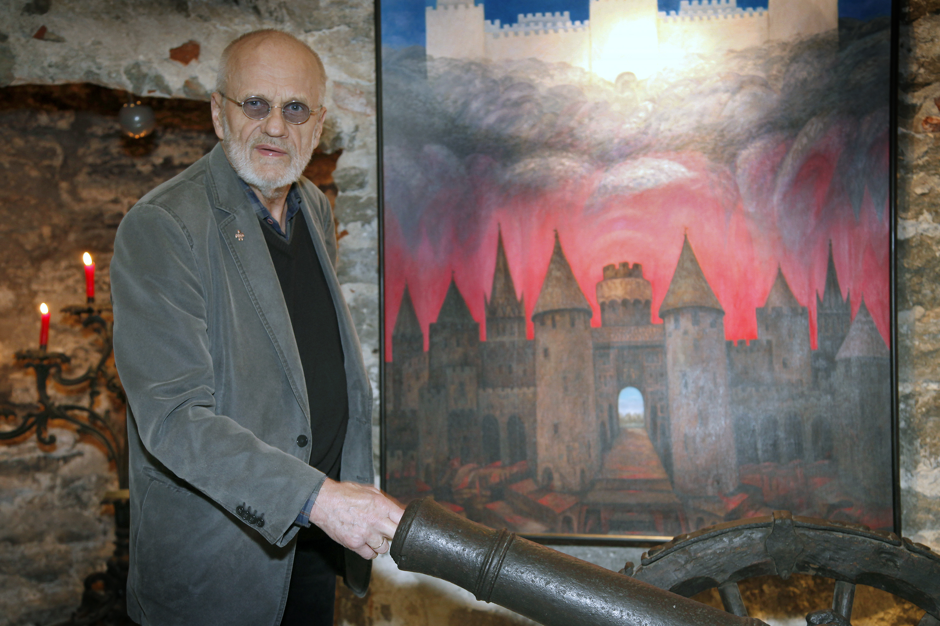 Jüri Arrak, Kiek in de Kökis 2013 (2)